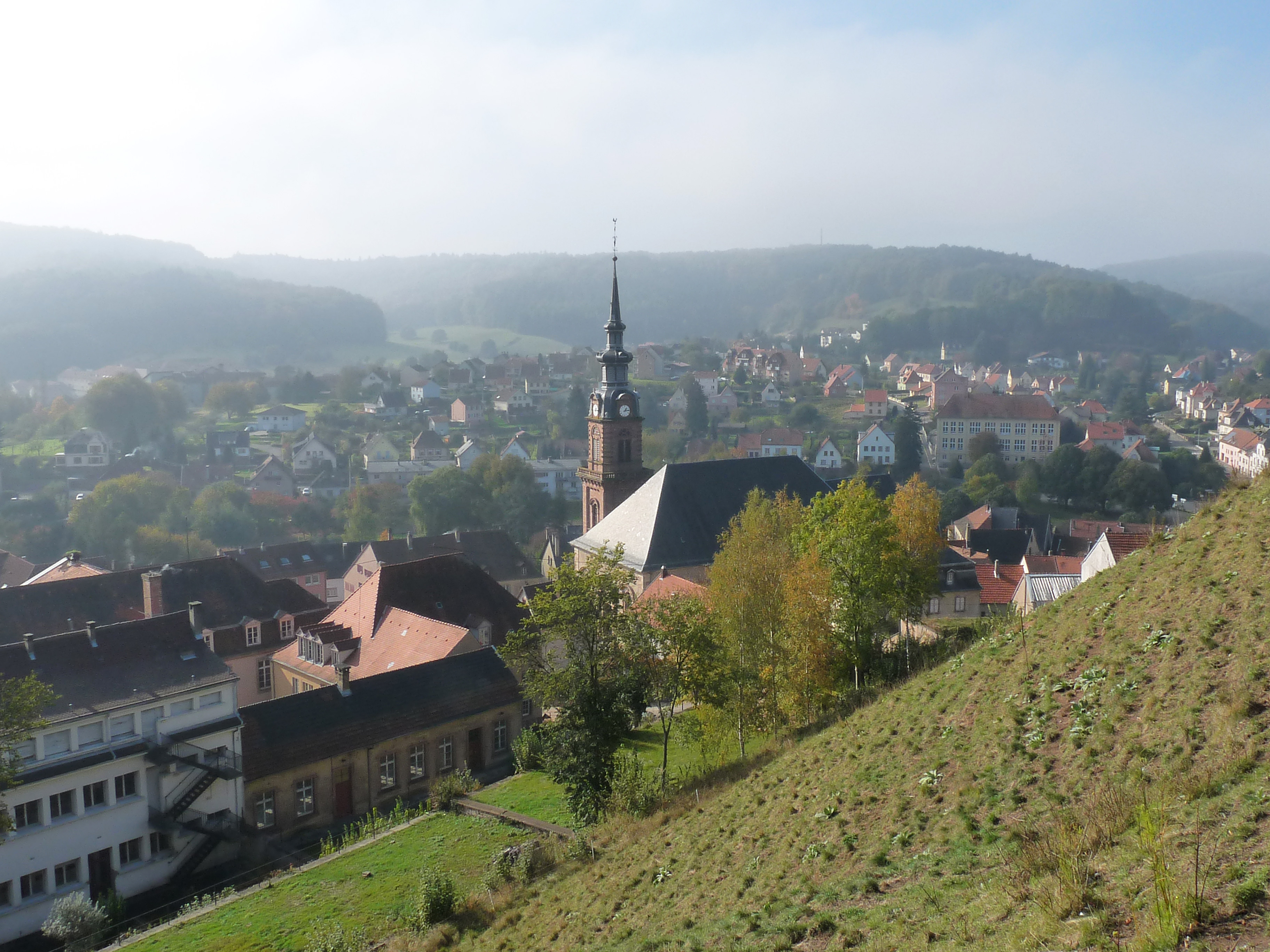 Vue de Bitche depuis la citadelle